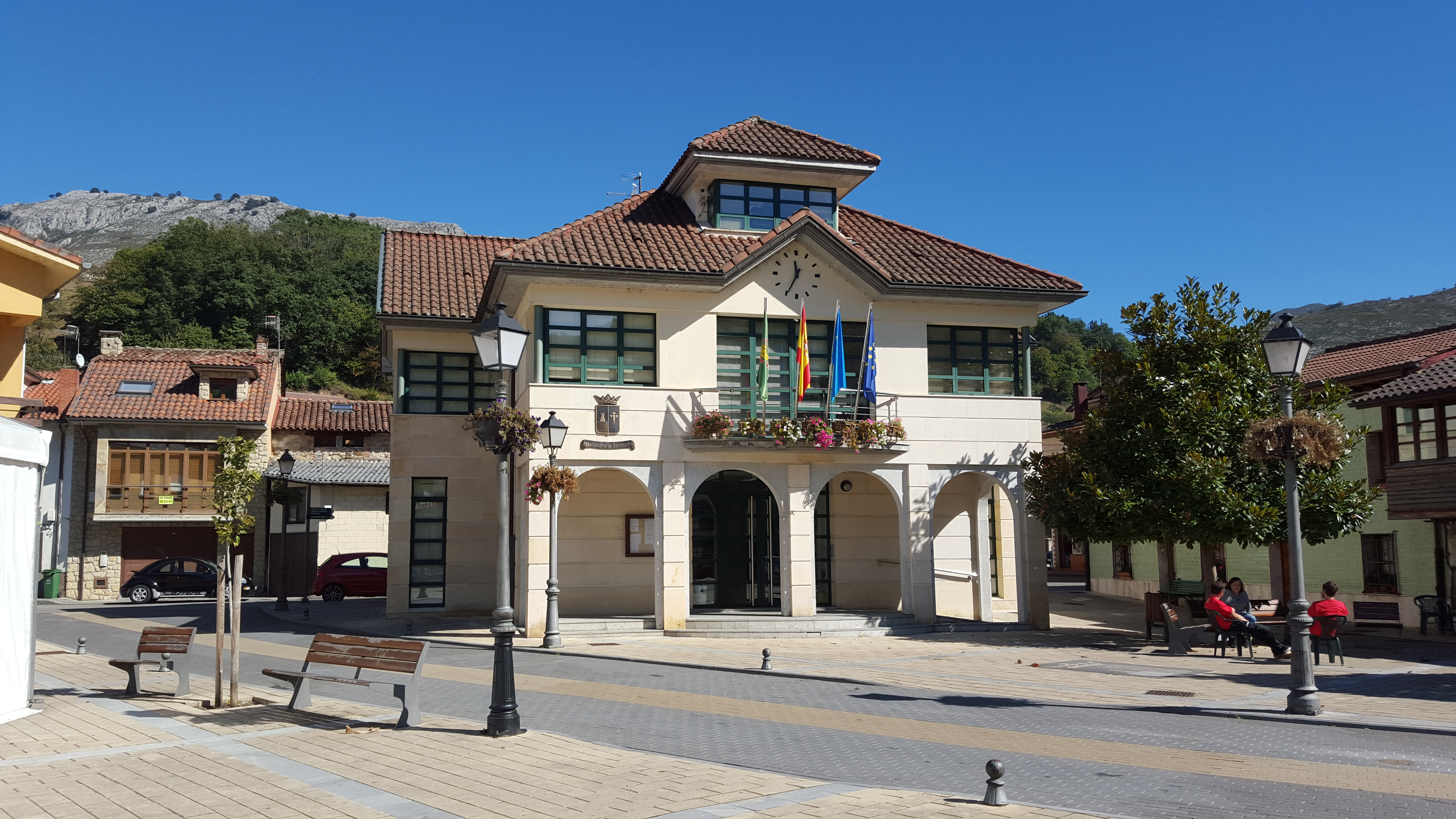 Rioseco, Premio Príncipe de Asturias al Pueblo Ejemplar 2009. Vista del ayuntamiento.